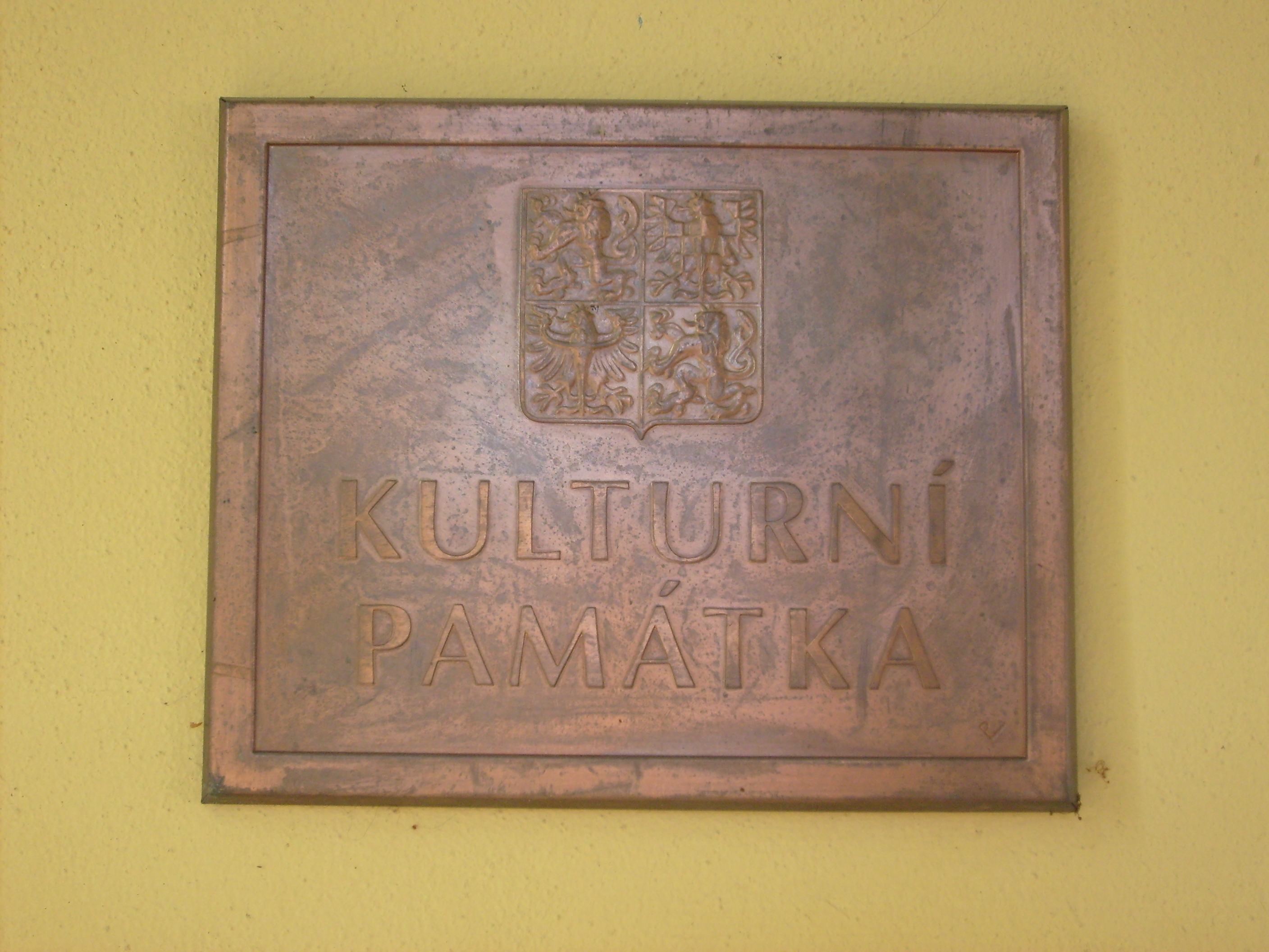 Kulturní památka, kostel v Licibořicích, Pardubice Region, Czech Republic